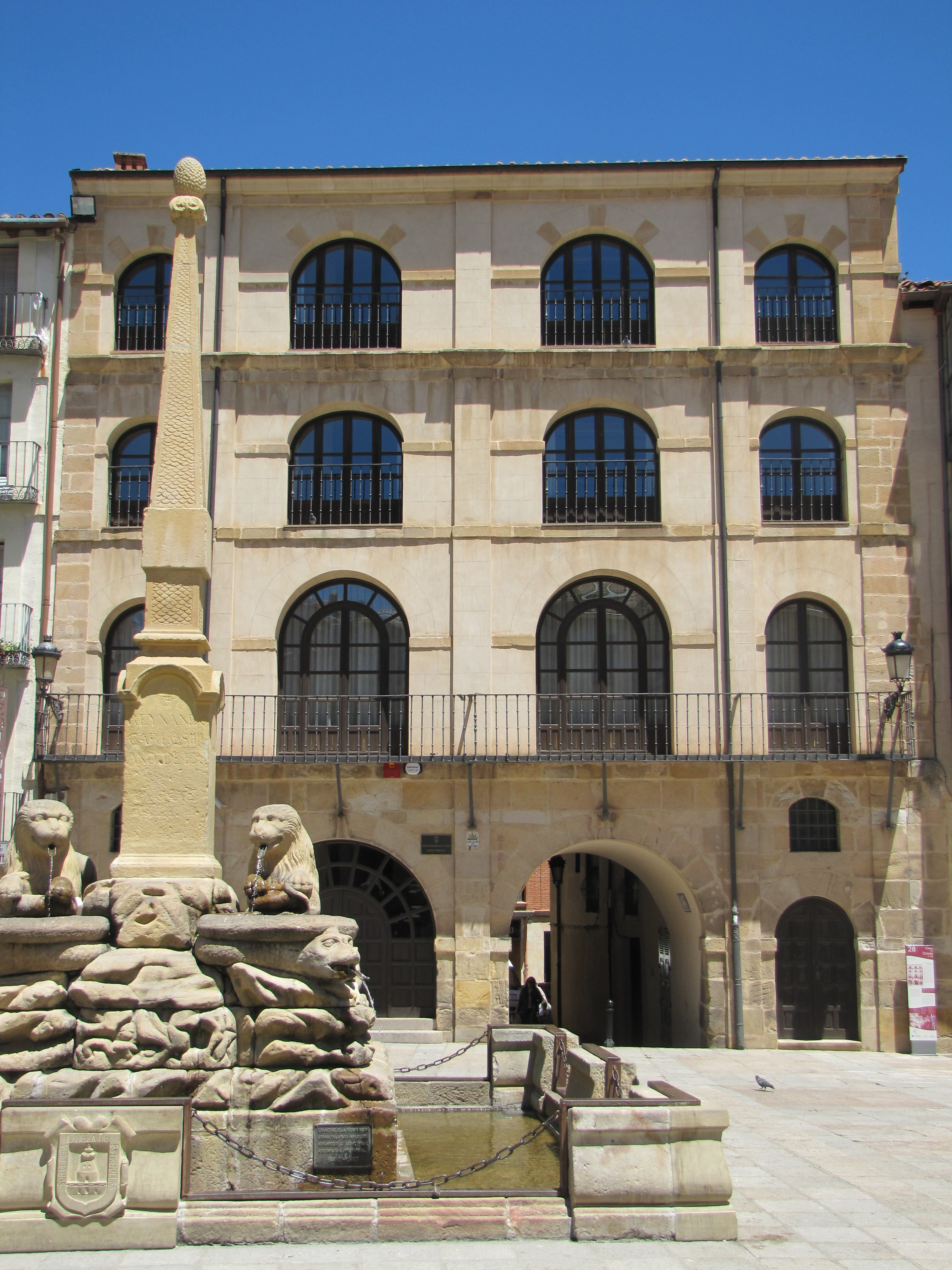 Casa del Comun (Soria)